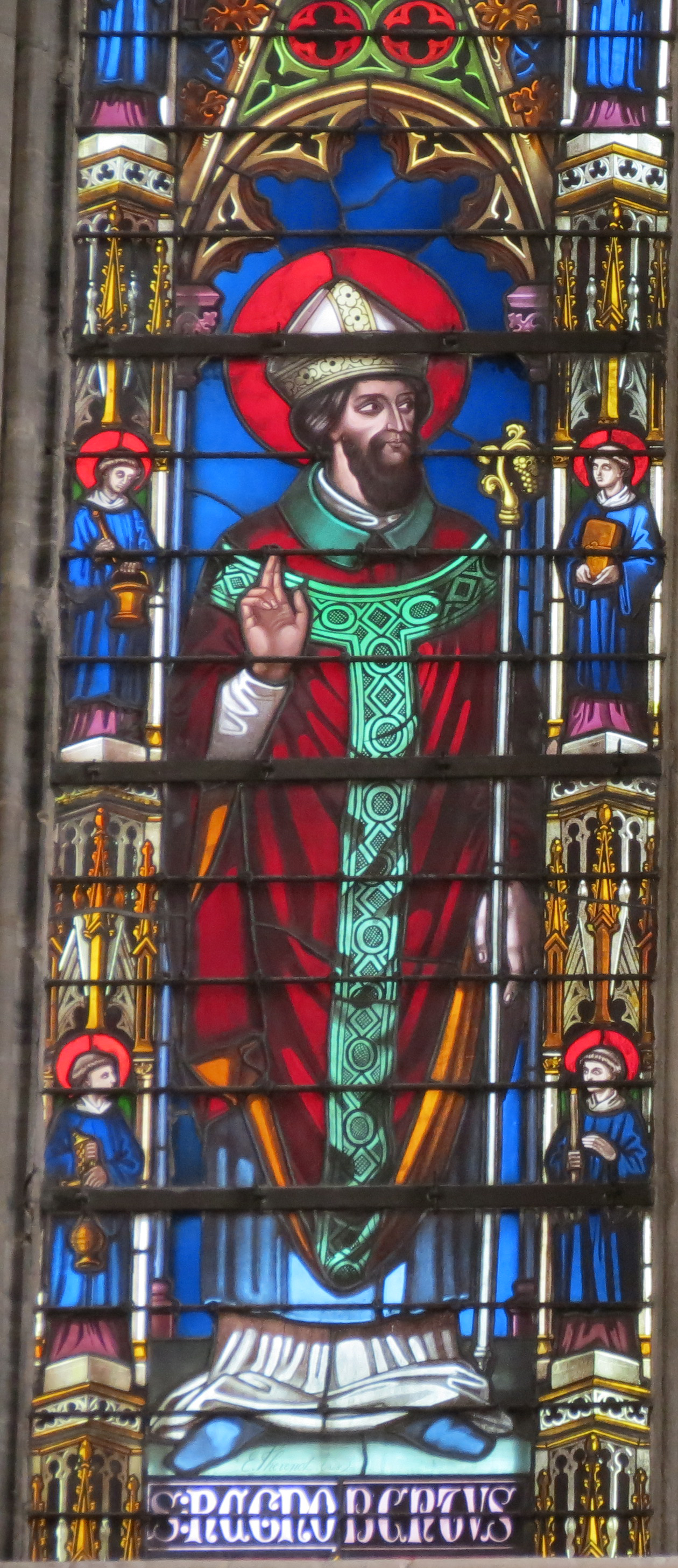 Cathédrale Notre-Dame de Bayeux, Calvados, France. Détail du vitrail du transept nord de 1848 de Thevenot représentant Saint-Ragnebert, évêque de Bayeux.